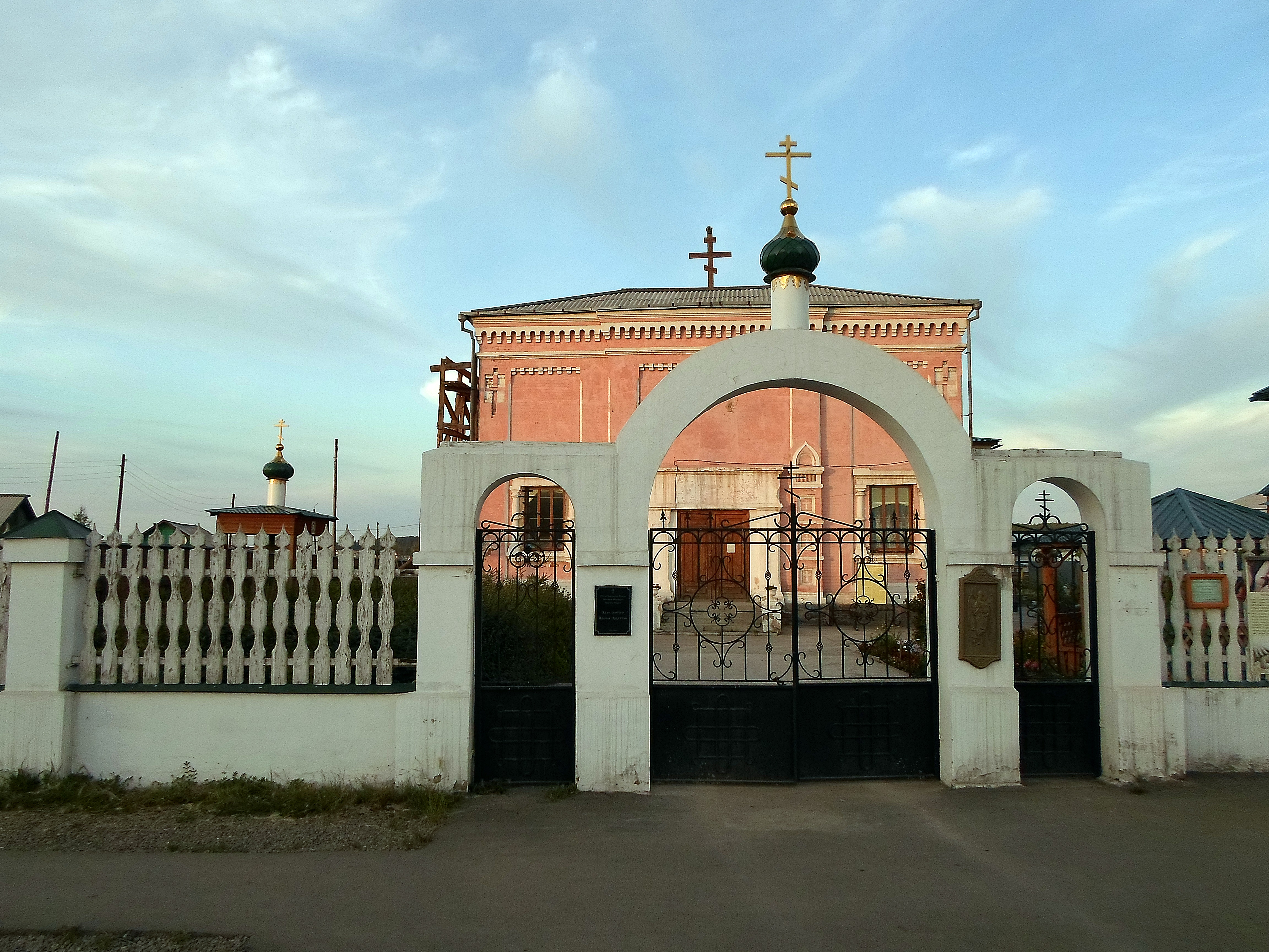 Церковь Иоанна Предтечи в Кутулике. Аларский район Иркутской области.